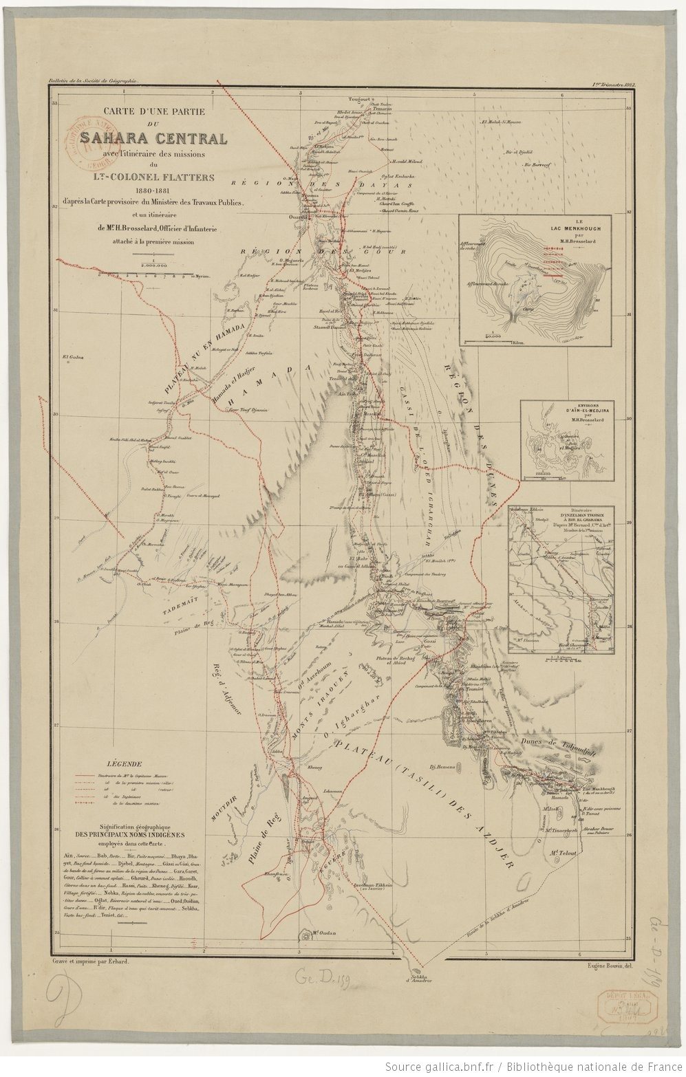 Carte d'une partie du Sahara central, avec l'itinéraire des missions du Lt-colonel Flatters, 1880-1881 / d'après la carte provisoire du ministère des travaux publics et un itinéraire de M. H. Brosselard ; 1/2 000 000. Eugène Bouvin, del